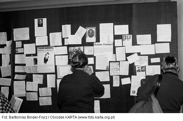 Tydzień Sumienia w Polsce - Ściana Pamięci